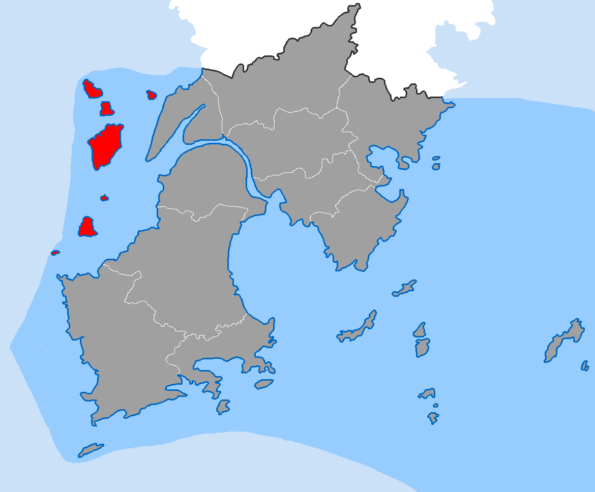 中文（中国大陆）: 海山乡在玉环市的位置